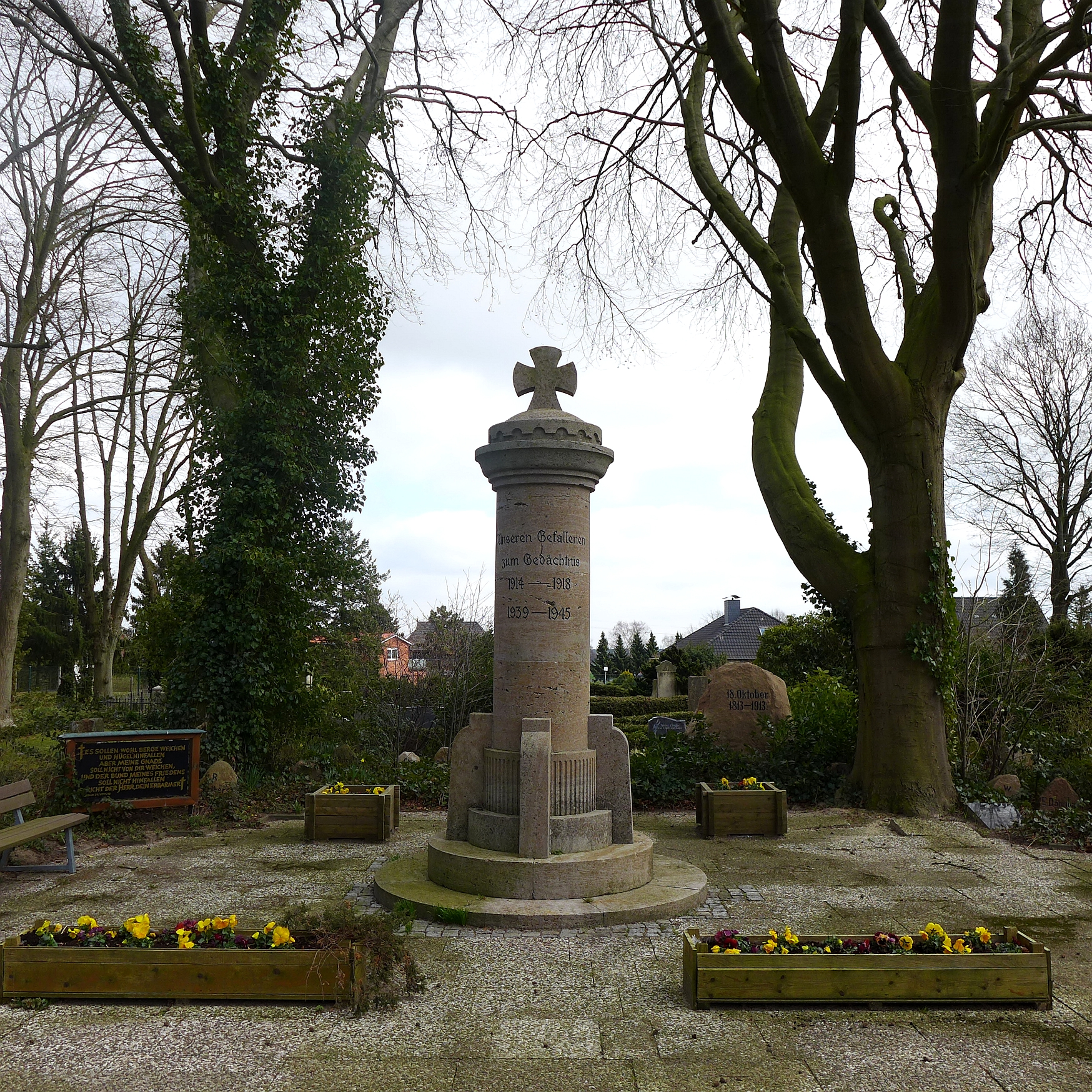 Gedenkstein auf dem Pattenser Friedhof für die Gefallenen der Weltkriege I und II.